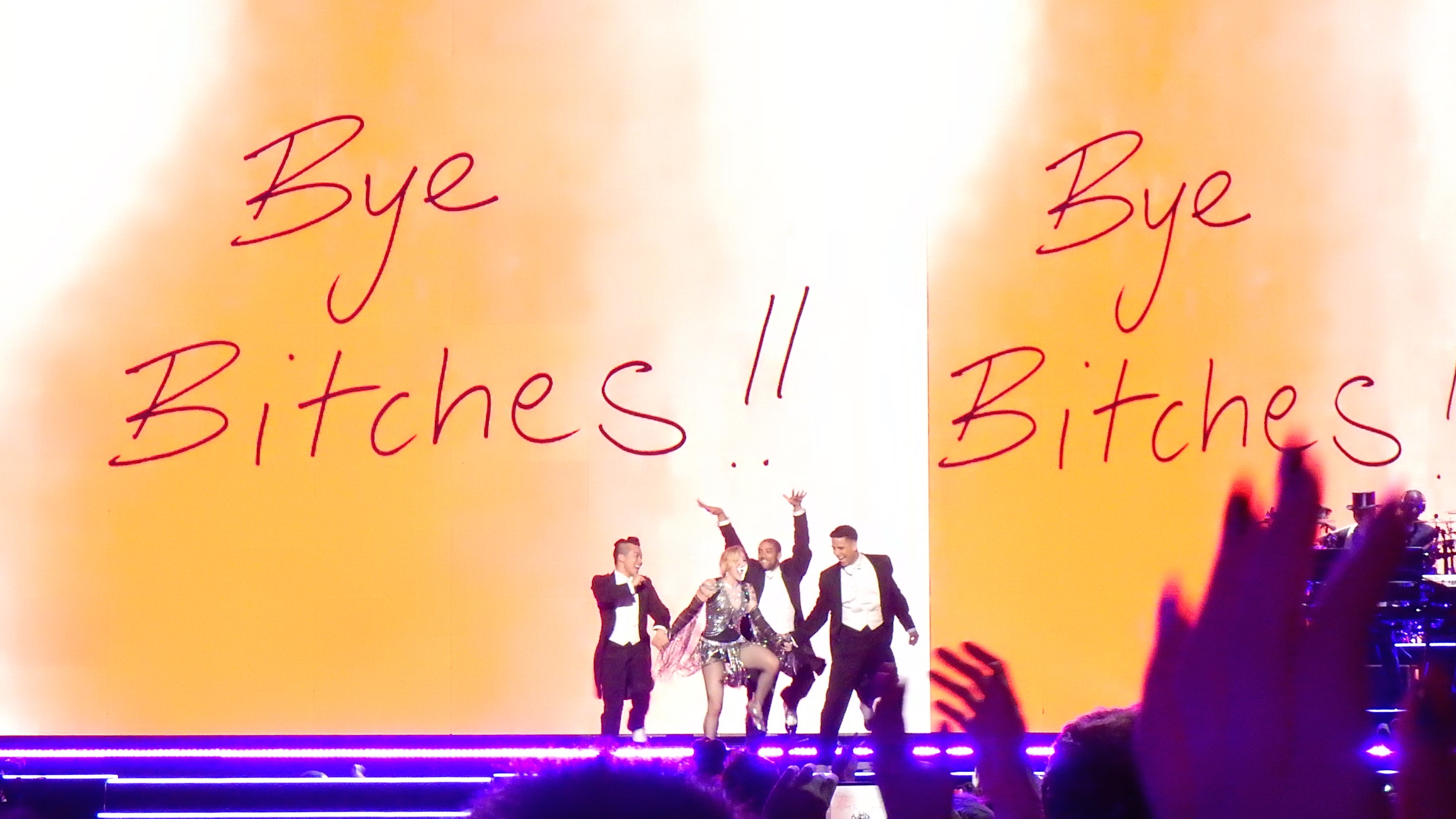 Madonna - Rebel Heart Tour Cologne 2